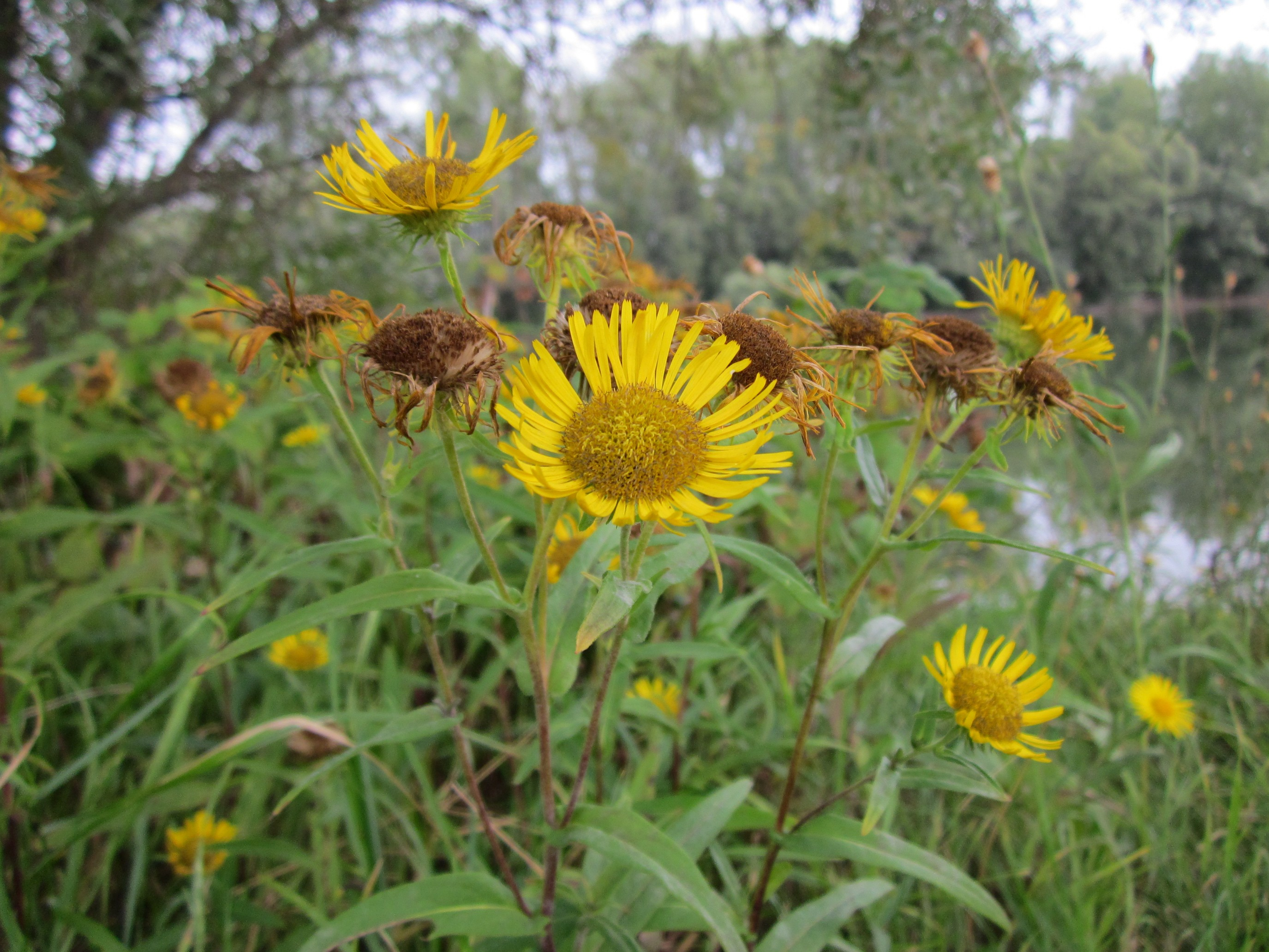 Wiesen-Alant (Inula britannica) im Rheinauenwald bei Altlußheim